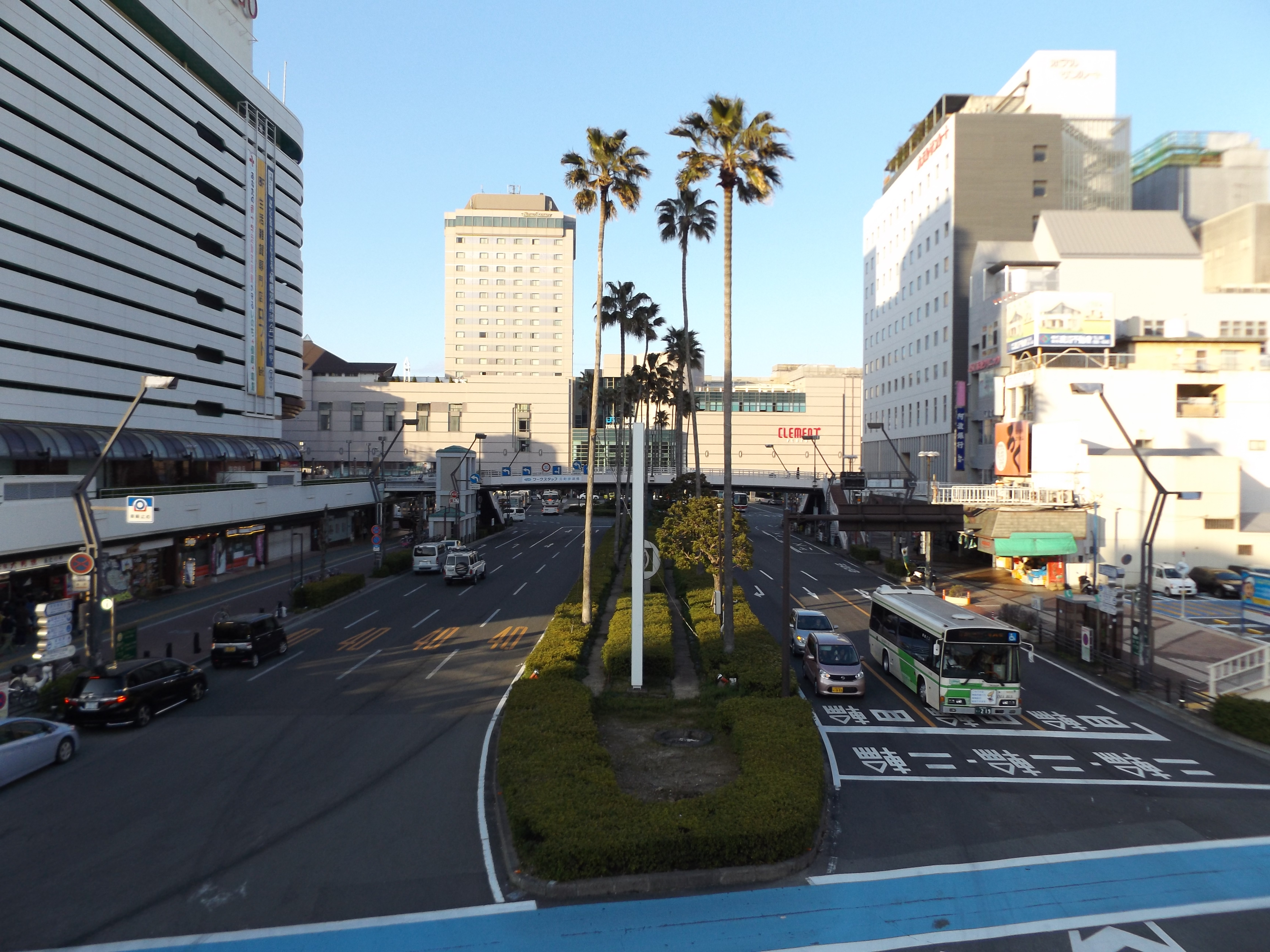 徳島市の元町交差点にある歩道橋から見た徳島県道13号徳島停車場線。元町交差点は県道13号の終点である。